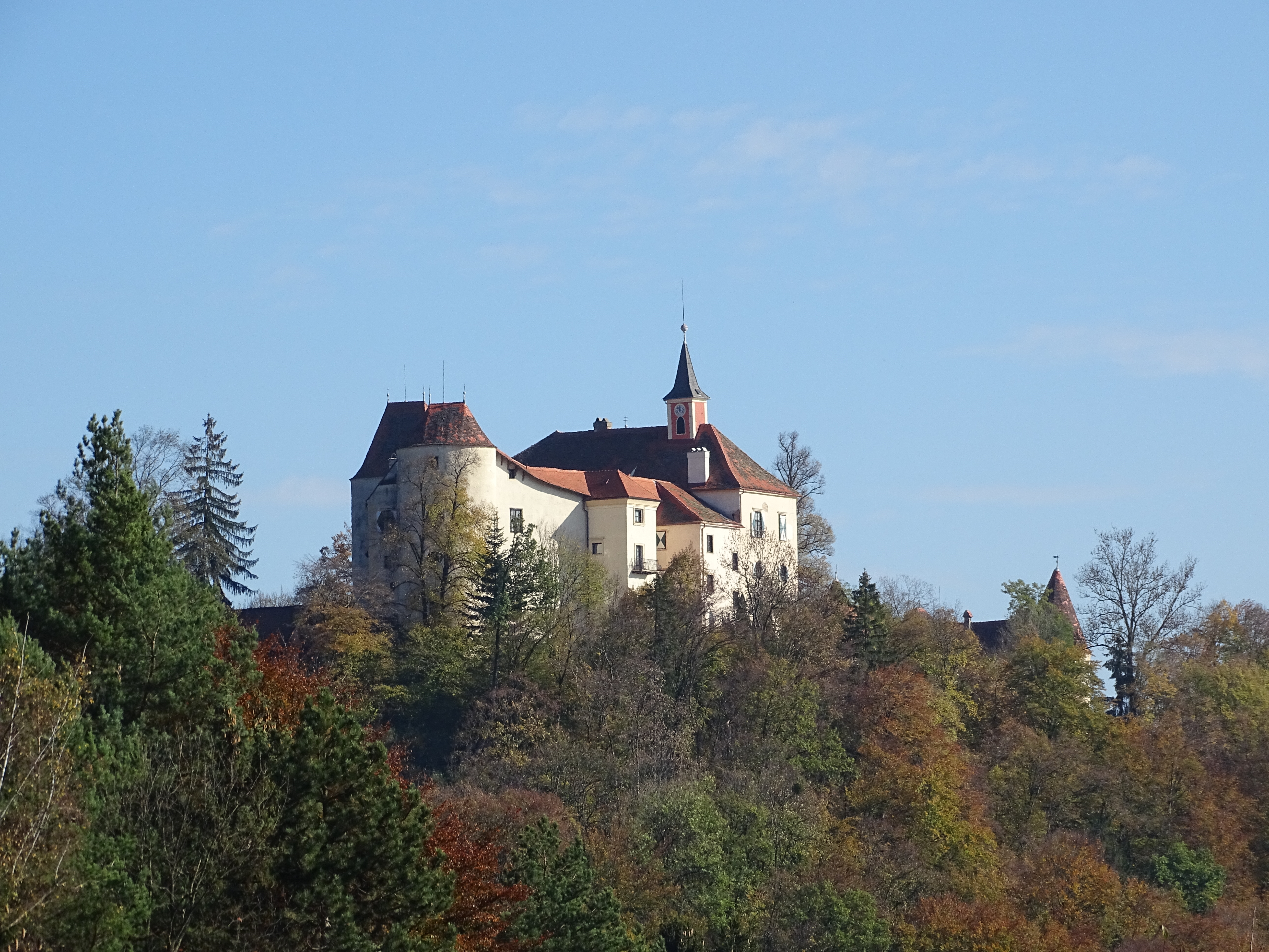 Blick vom Ortsteil Scherleiten auf das Schloss Plankenwarth